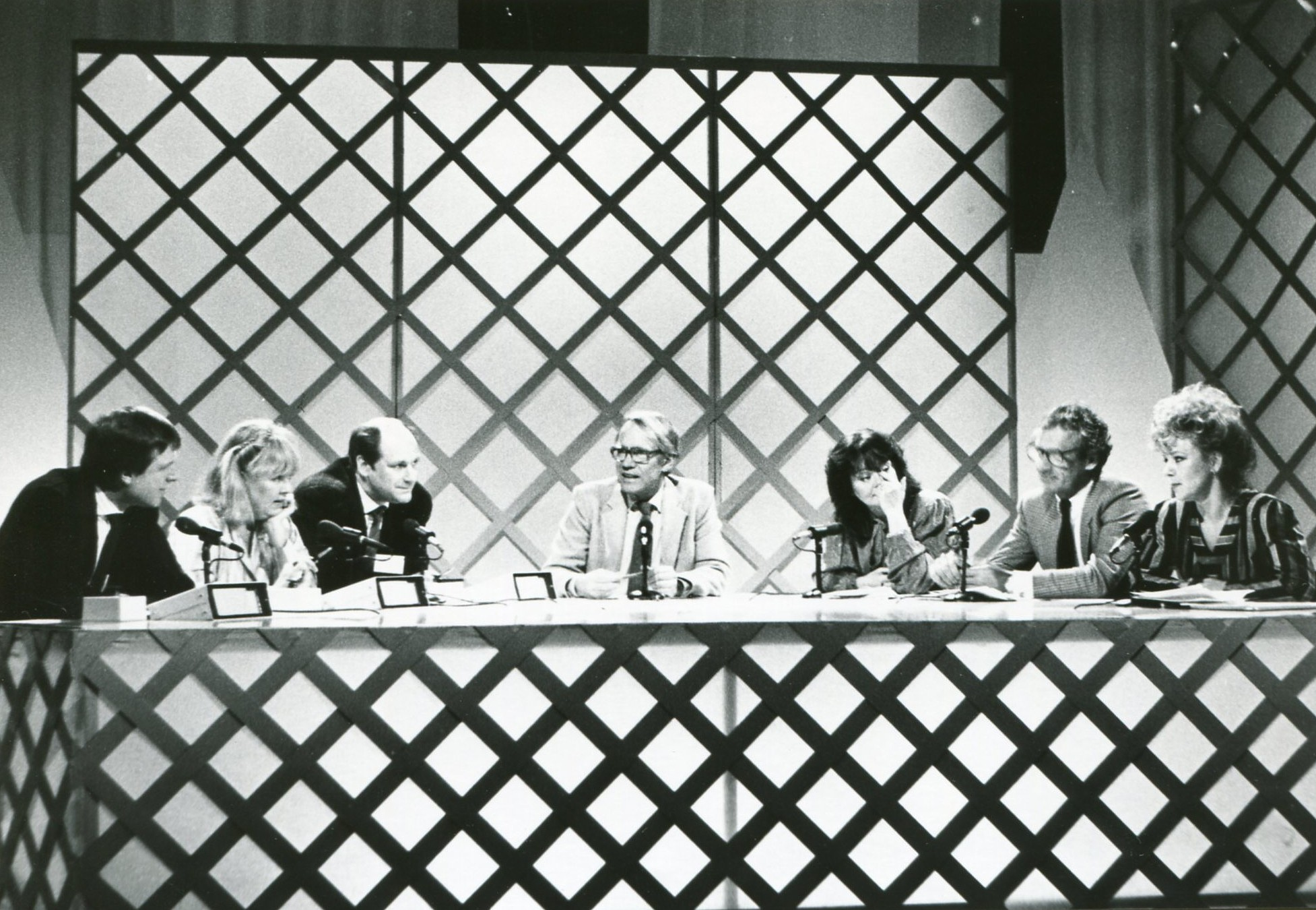 Lennart Swahn i mitten med programmet Babbel på Stockholmsmässan "Vision 86". Fr.v.: Tommy Engstrand, Monica Dominique, Tomas Bolme, Lennart Swahn, Anna Sundqvist, Runo Edström som agerade "stand in" för Helge Skoog, Mona Seilitz.